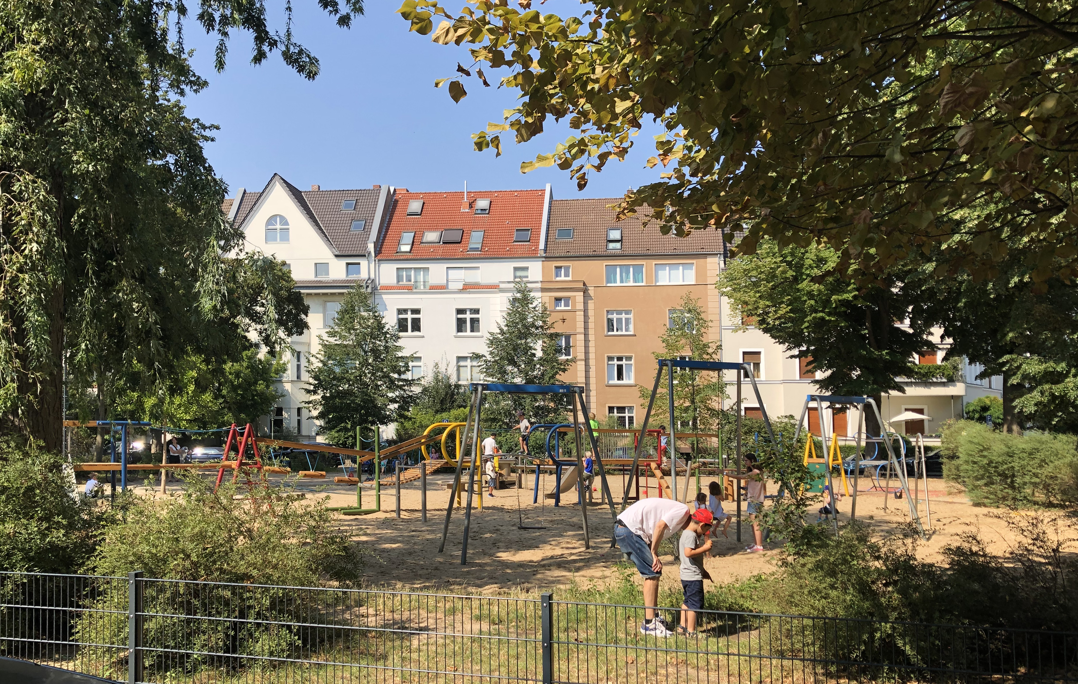 Salierplatz, Spielplatz und Häuser Salierplatz 2, 4, 6, Düsseldorf-Oberkassel